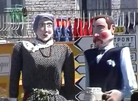 Adolphine la Cafus et Chope le Brasseur, géants de Bruay-sur-l'Escaut